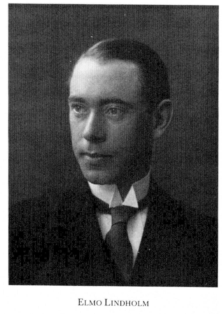 Elmo Lindholm.